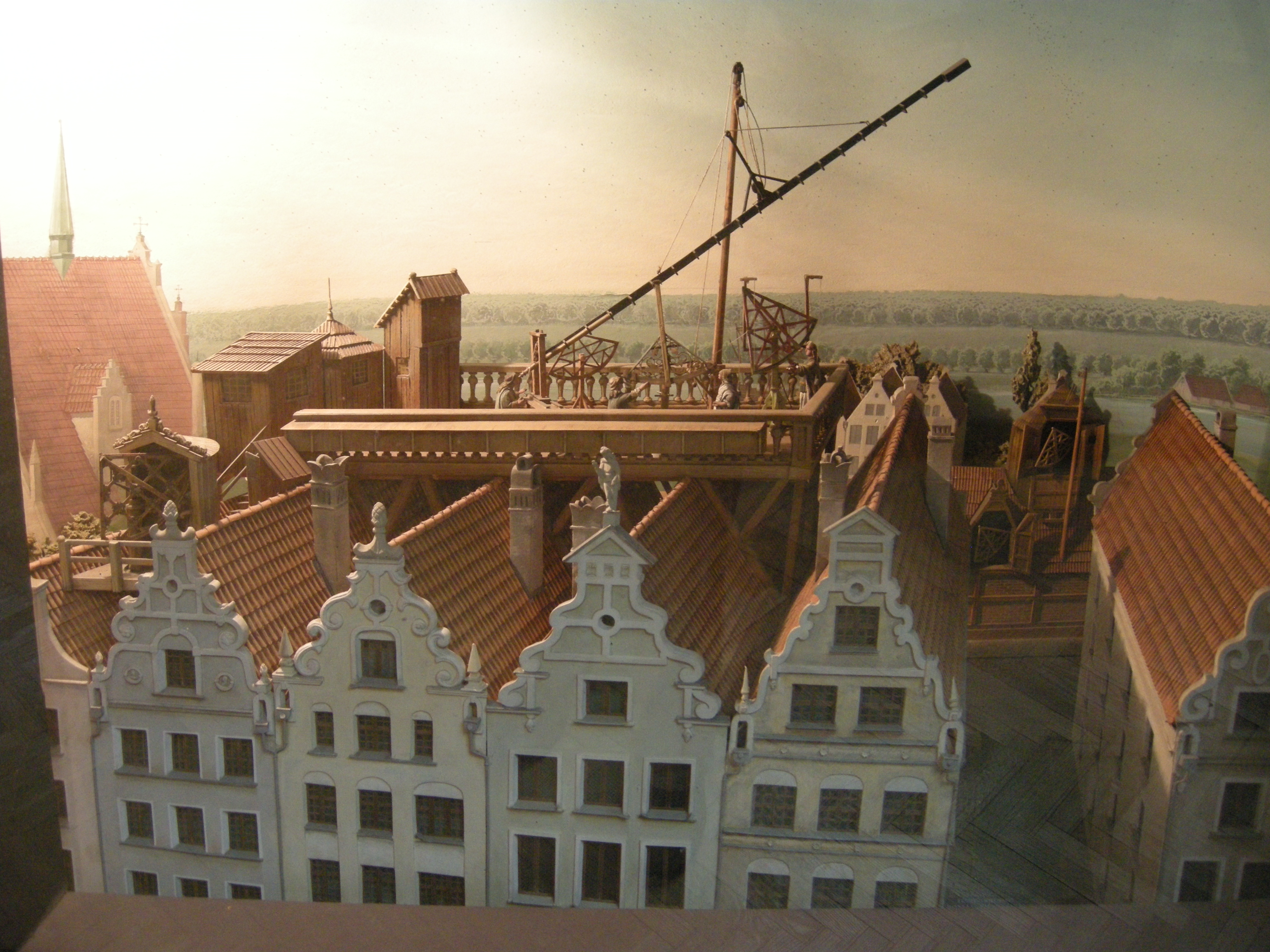 Makieta Obserwatorium Astronomicznego Jana Heweliusza w Gdańsku. Makieta znajduje się w Muzeum Techniki w Warszawie.